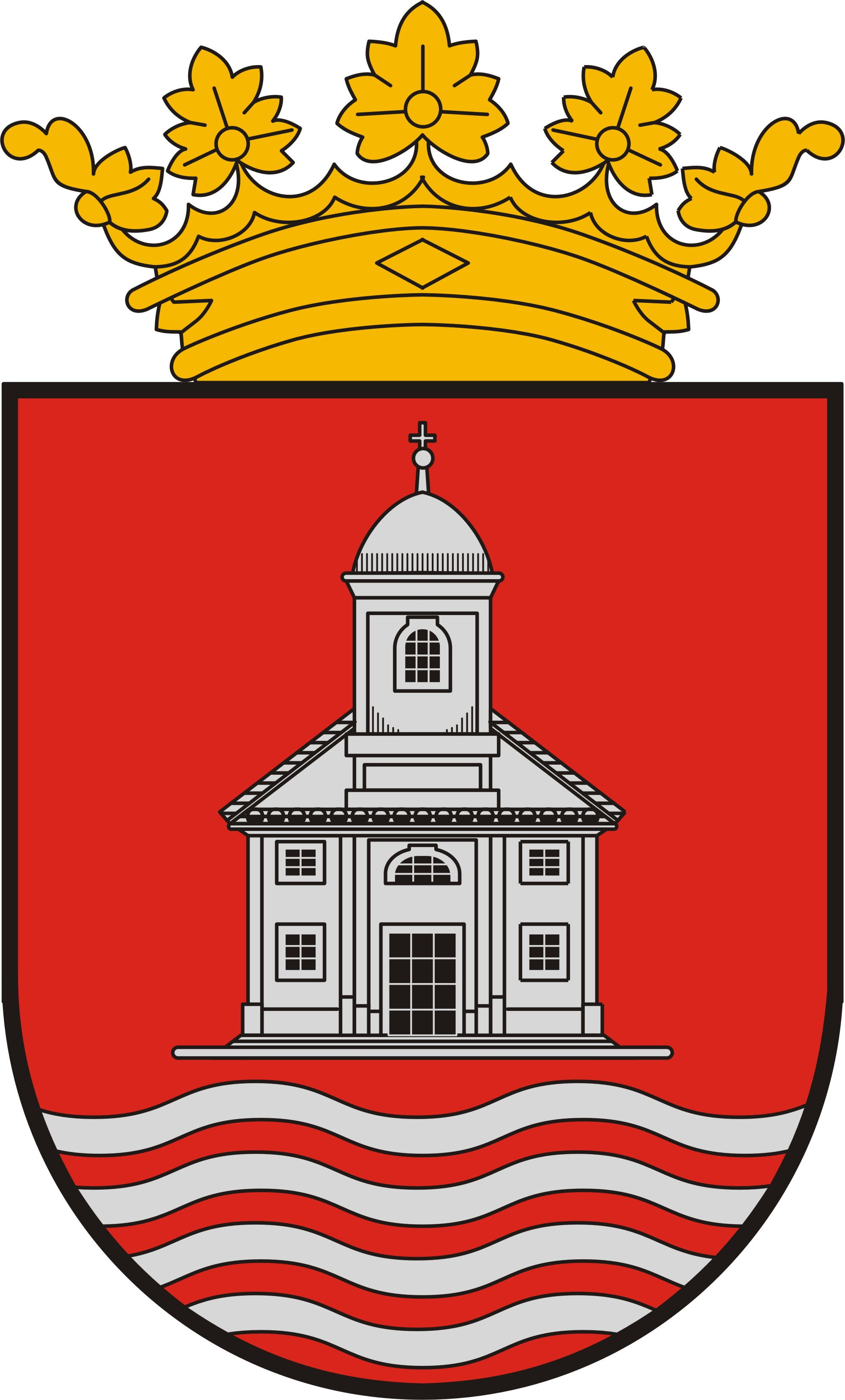 Gemeinde Pinkamindszent